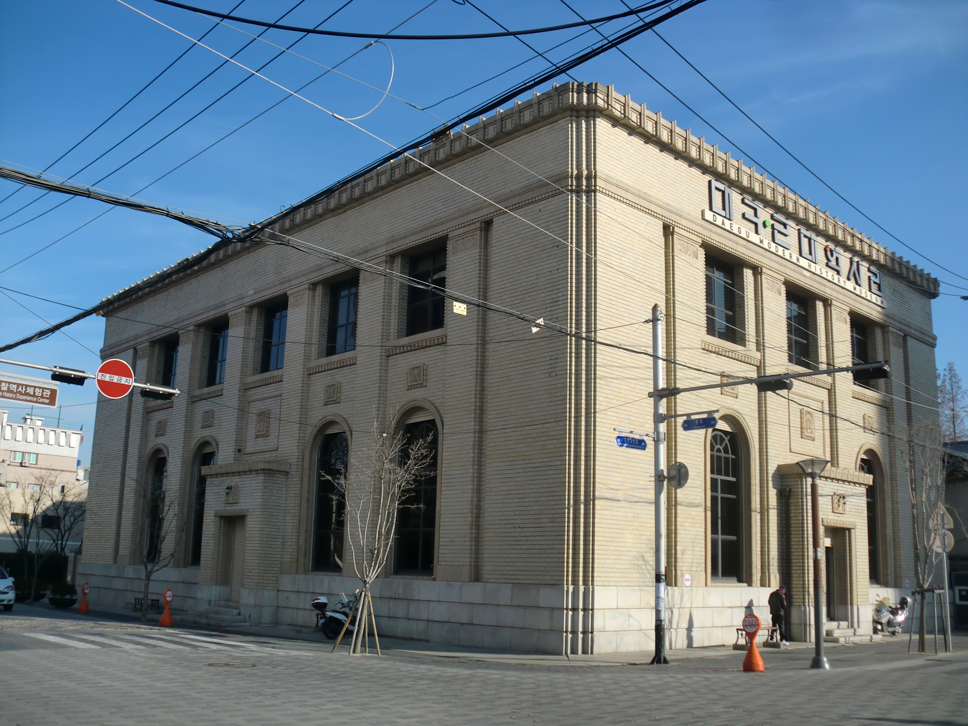 대구광역시 중구에 있는 대구근대역사관